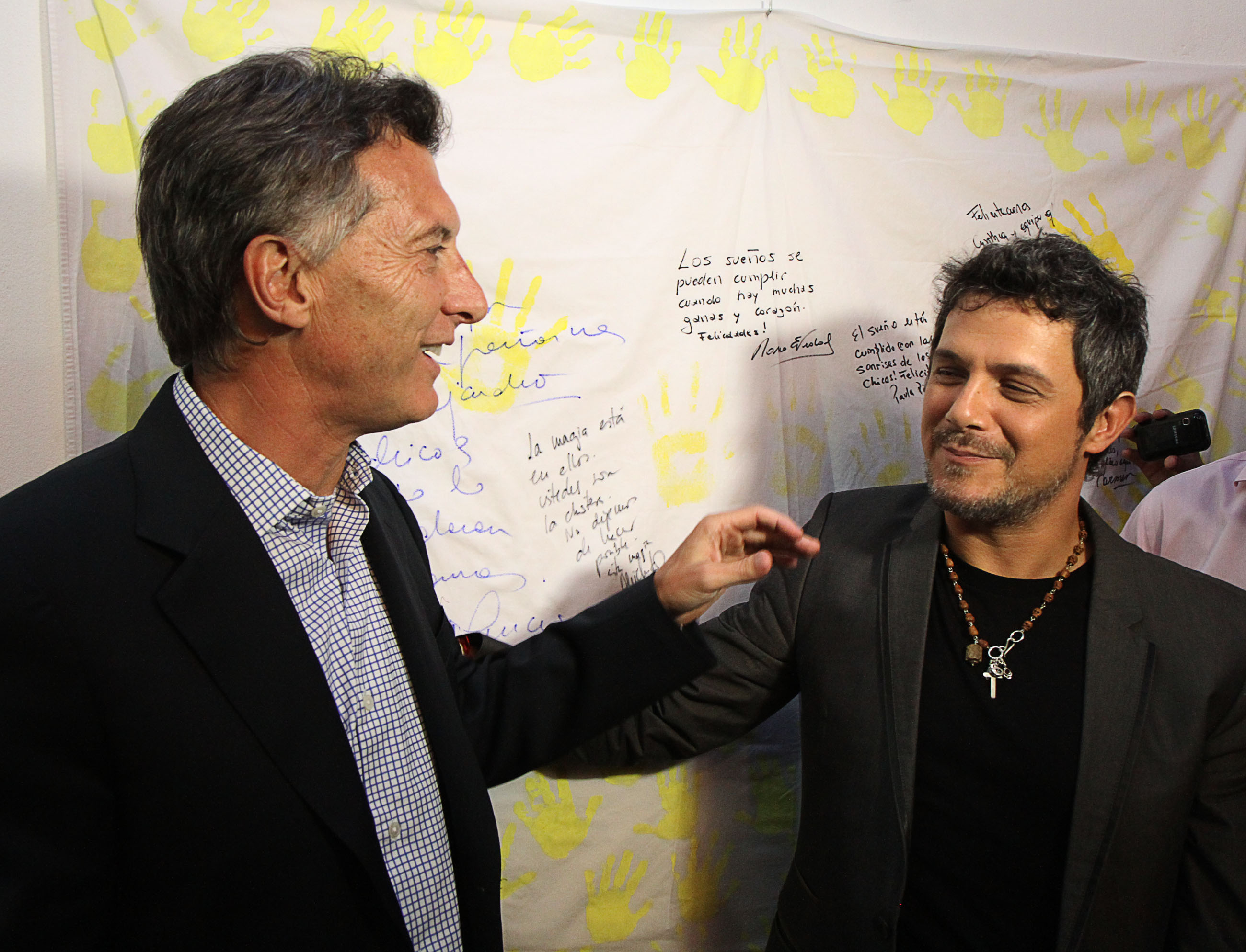 Buenos Aires. Marzo 11 de 2013. El Jefe de Gobierno porteño, Mauricio Macri, compartió esta tarde una actividad con el cantante español Alejandro Sanz, en el CPI Mis Sueños, en el barrio de Abasto.- Foto Matías Repetto-gv/GCBA.